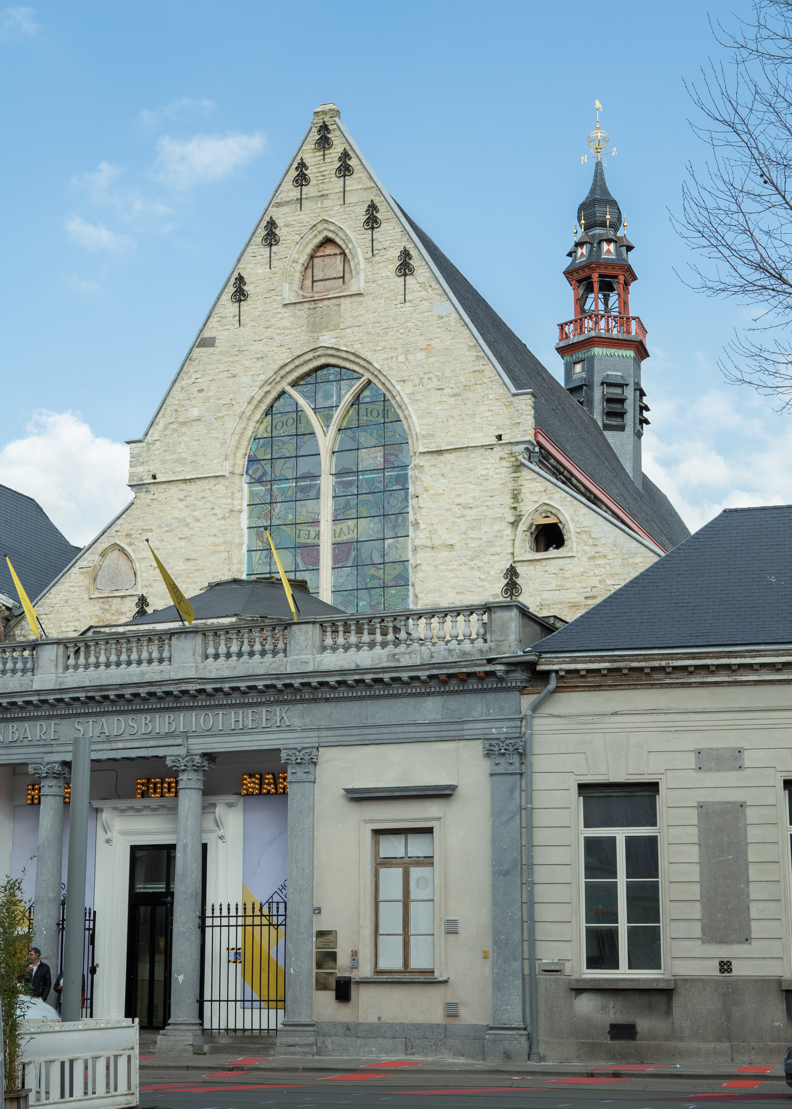 Baudelokapel